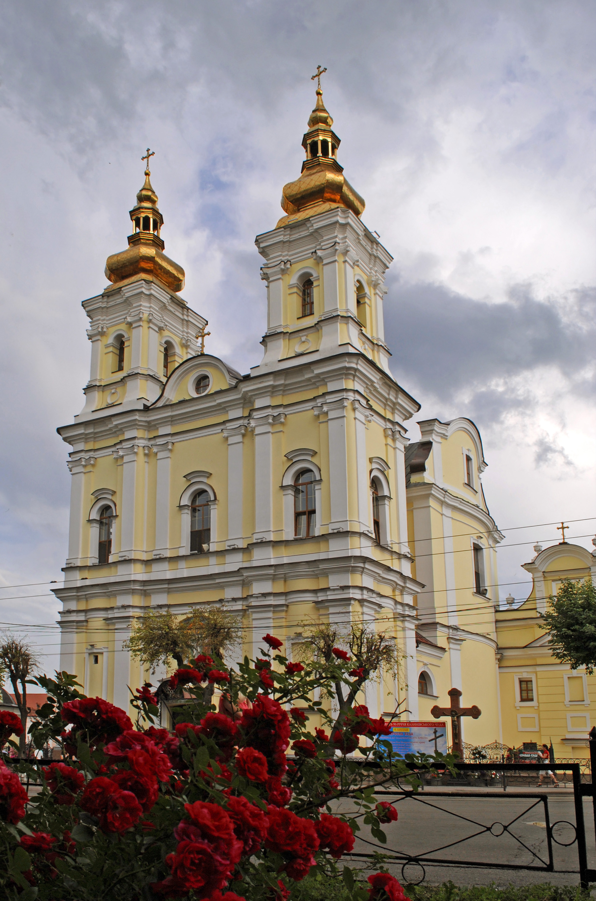 Домініканський монастир - Костьол, Вінниця, вул. Соборна, 23